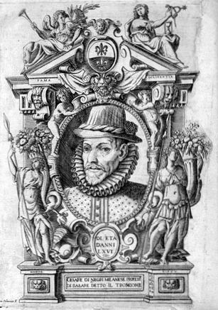 The author of the book Nvove inventioni di balli; opera vaghissima nella quale si danno i giusti modi del ben portar la vita, et di accommodarsi con ogni leggiadria di movimento alle creanze et gratie d'amore, Cesare Negri (1535-1604), depicted in this book.